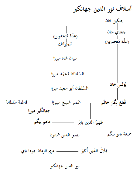 شجرة نسب نور الدين جهانكير رابع سلاطين مغول الهند.